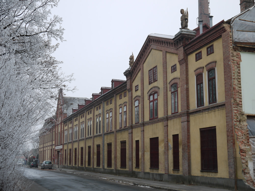 Konservenfabrik, Inzersdorfer Konservenfabrik